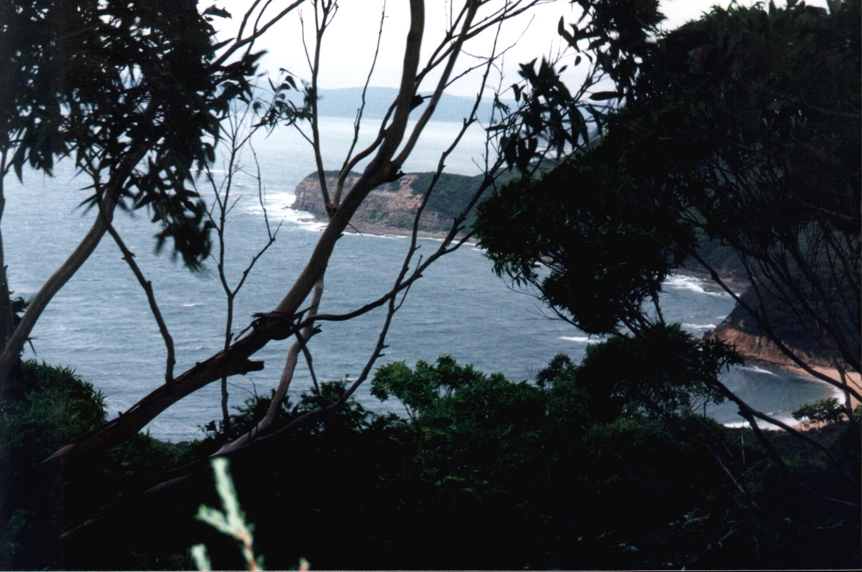 Bouddi National Park, North of Sydney